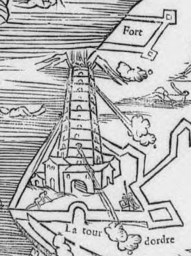 La figure de Boulongne ensemble des fortz et places circonvoysines / par Pierre Haultin. 1550. Collection d'Anville